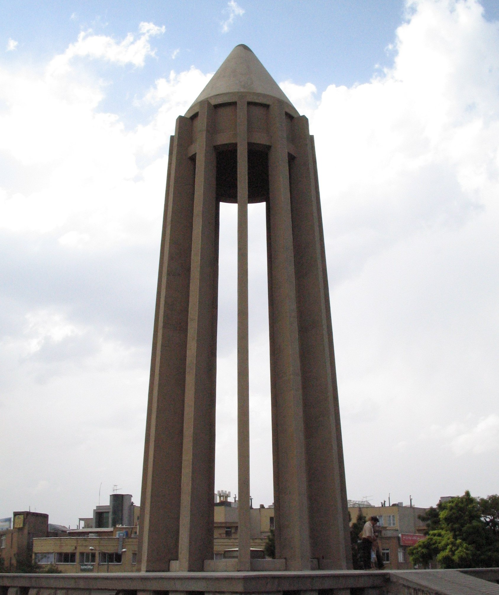 Abu Ali Sina (Avicenna) Mausoleum in Hamedan, Iran.